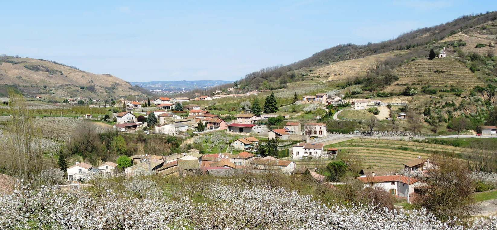 Saint-Etienne-de-Valoux détail